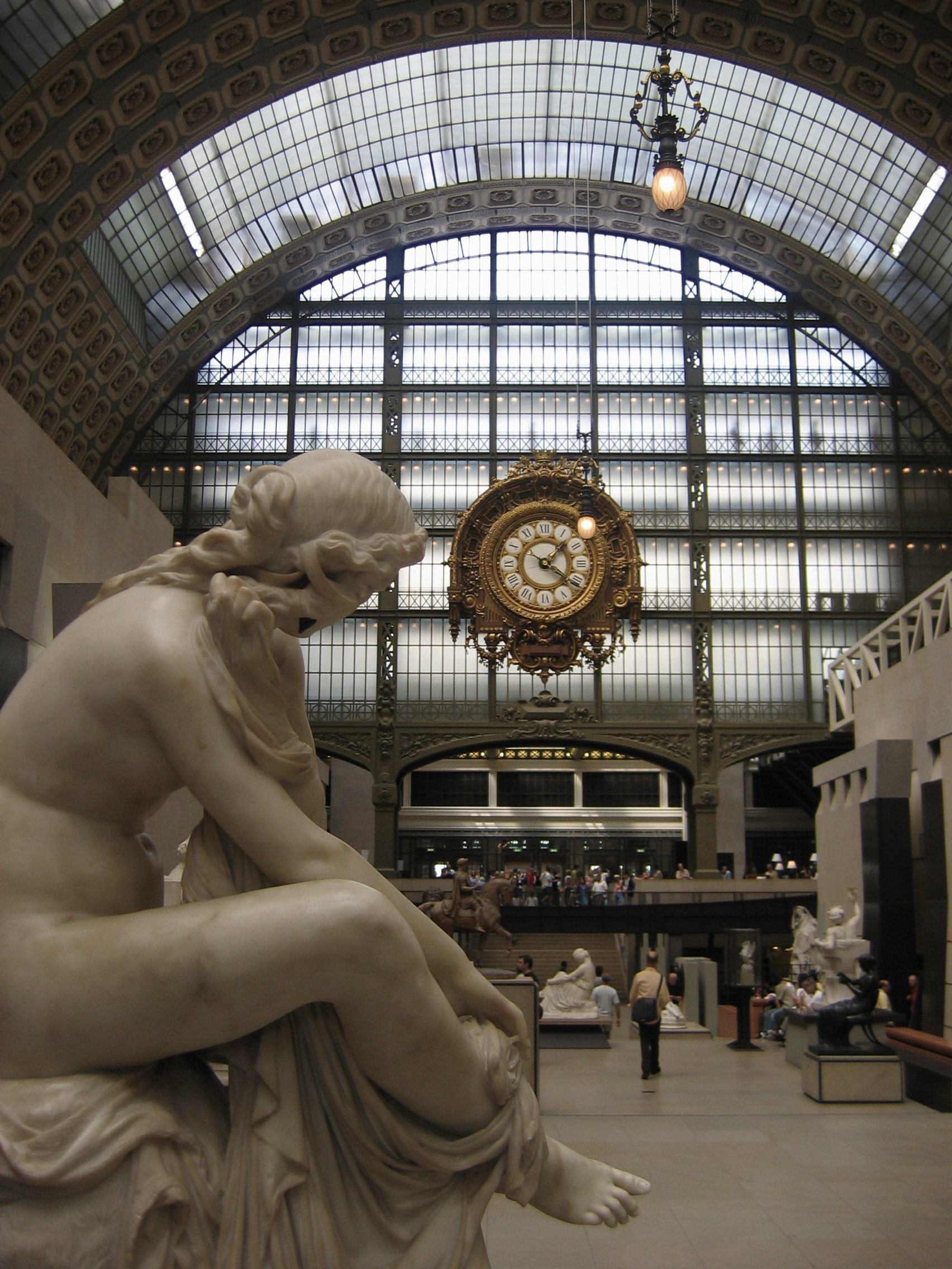 Jean-Baptiste Paul Cabet: Suzanne surprise au bain aka La Sortie du bain, marble 1861, Musée d'Orsay